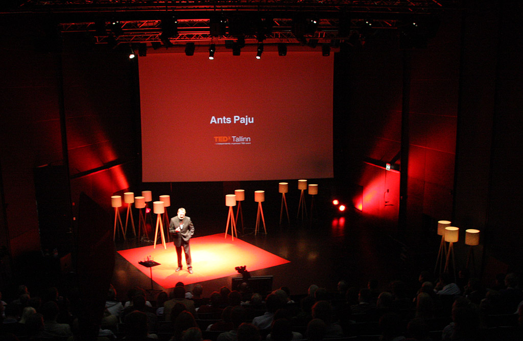 Ants Paju esinemas esimesel TEDxTallinn konverentsil 2009. aastal. [1]